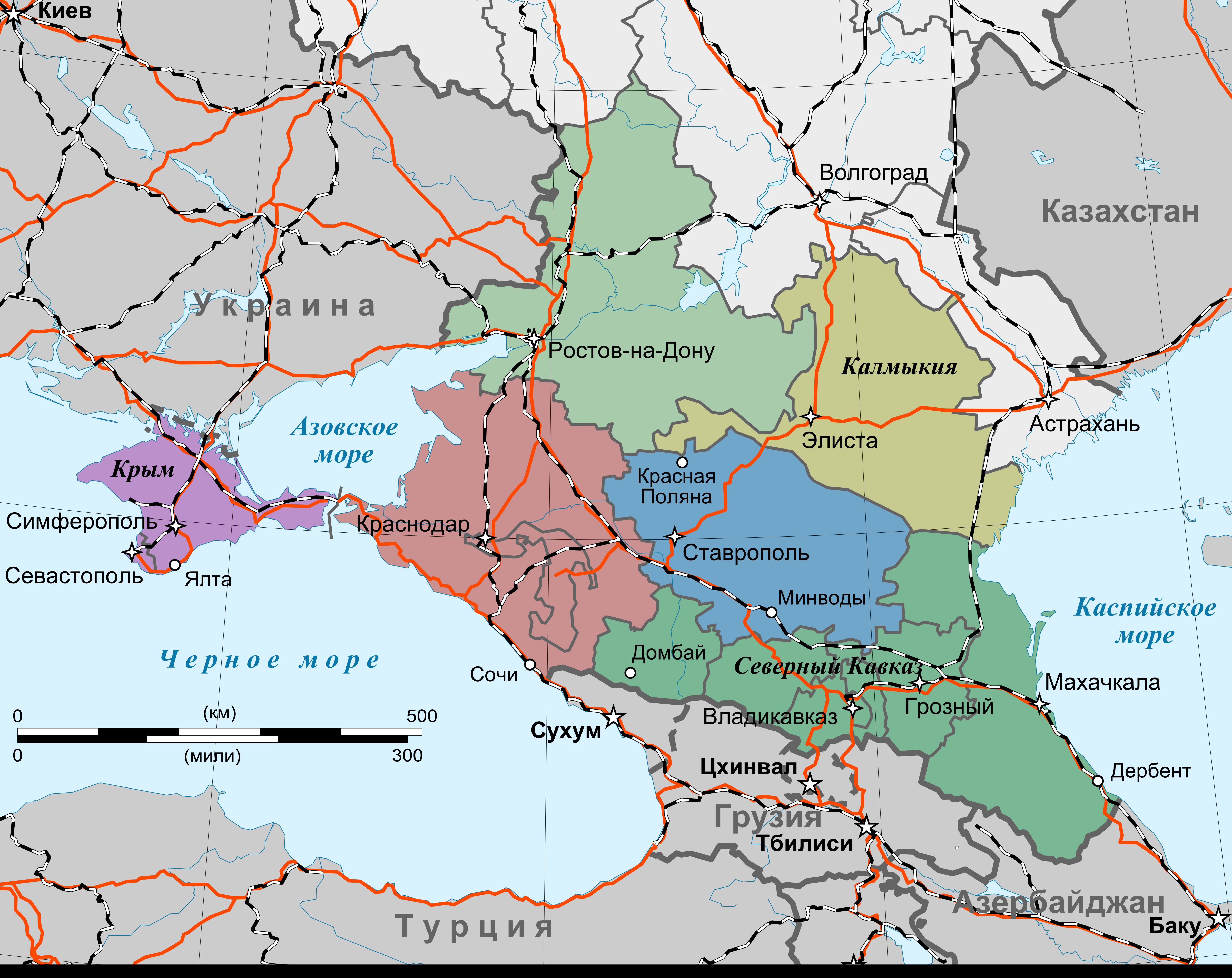 Карта южной России для Викигида